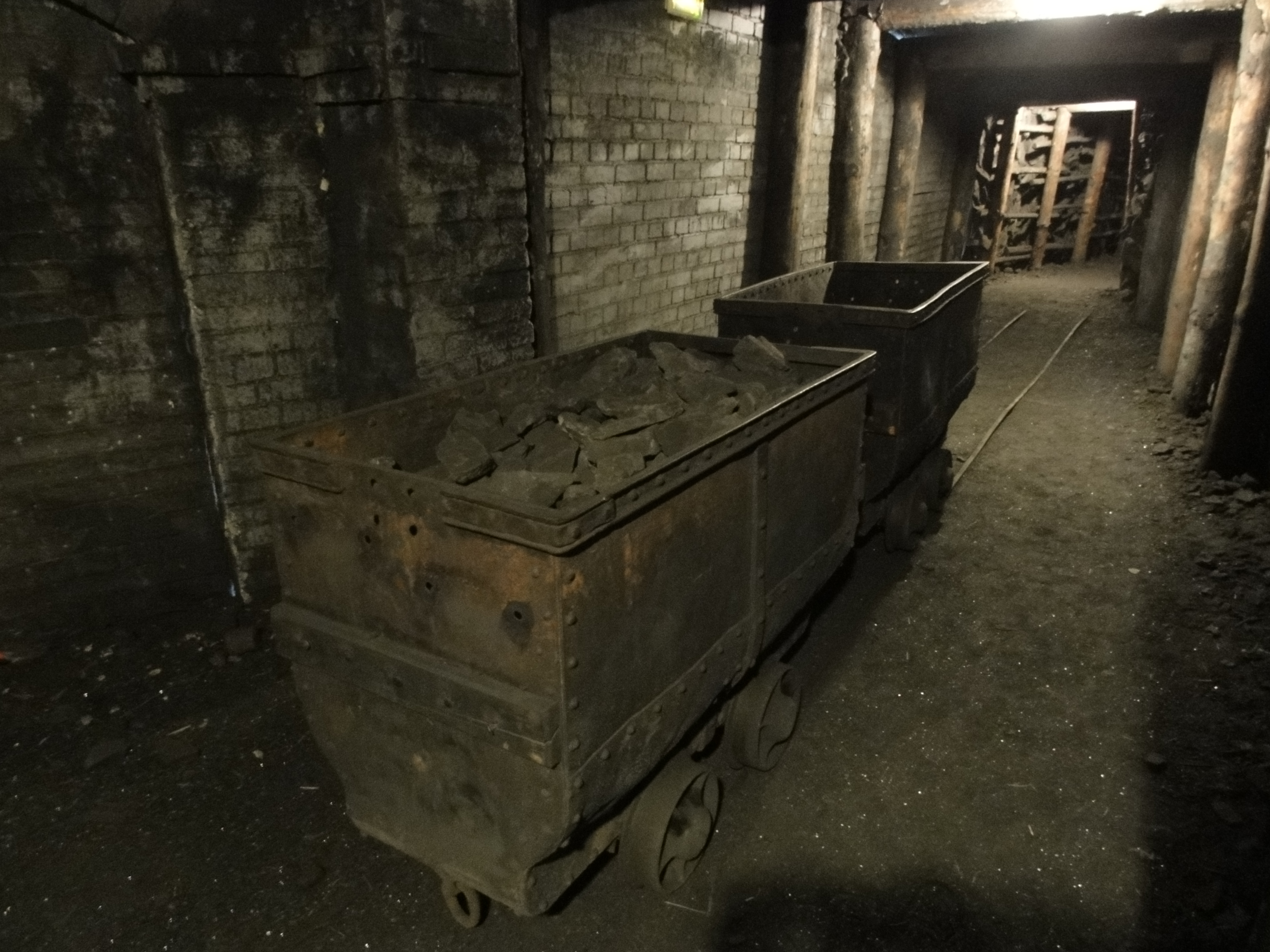 Ce document a été réalisé avec l’aimable autorisation de la Communauté d'agglomération de la Porte du Hainaut. English | français | +/−